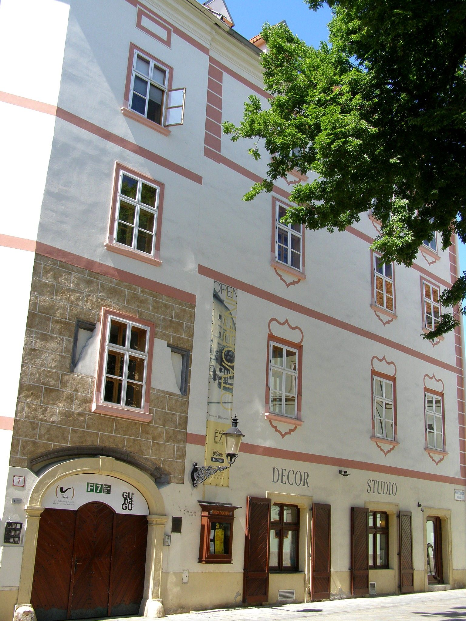 Františkánske nám. č. 7 Object location48° 08′ 38.4″ N, 17° 06′ 29.88″ E